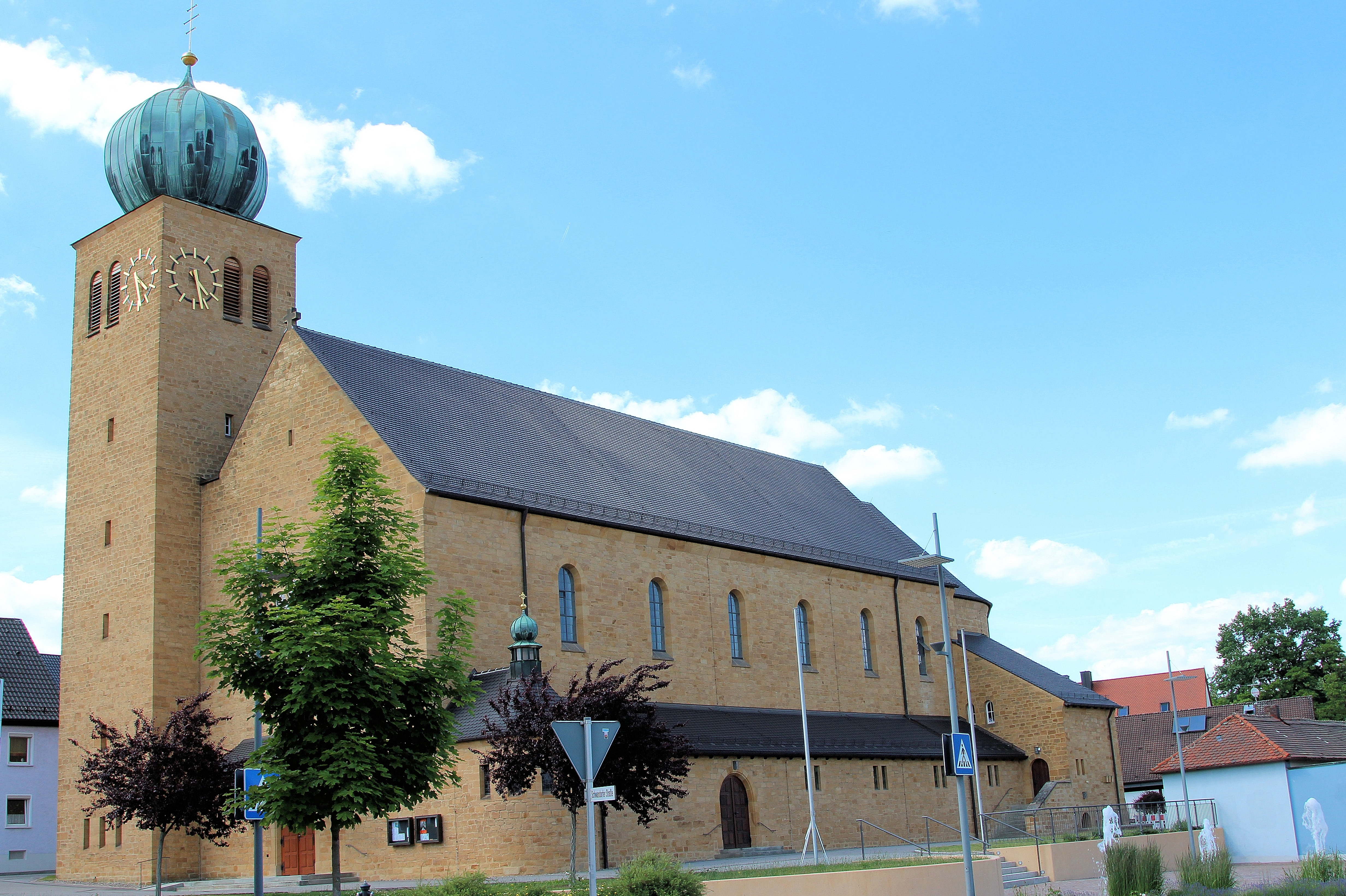 Pfarrkirche St. Barbara; Bodenwöhr, Landkreis Schwandorf, Oberpfalz, Bayern